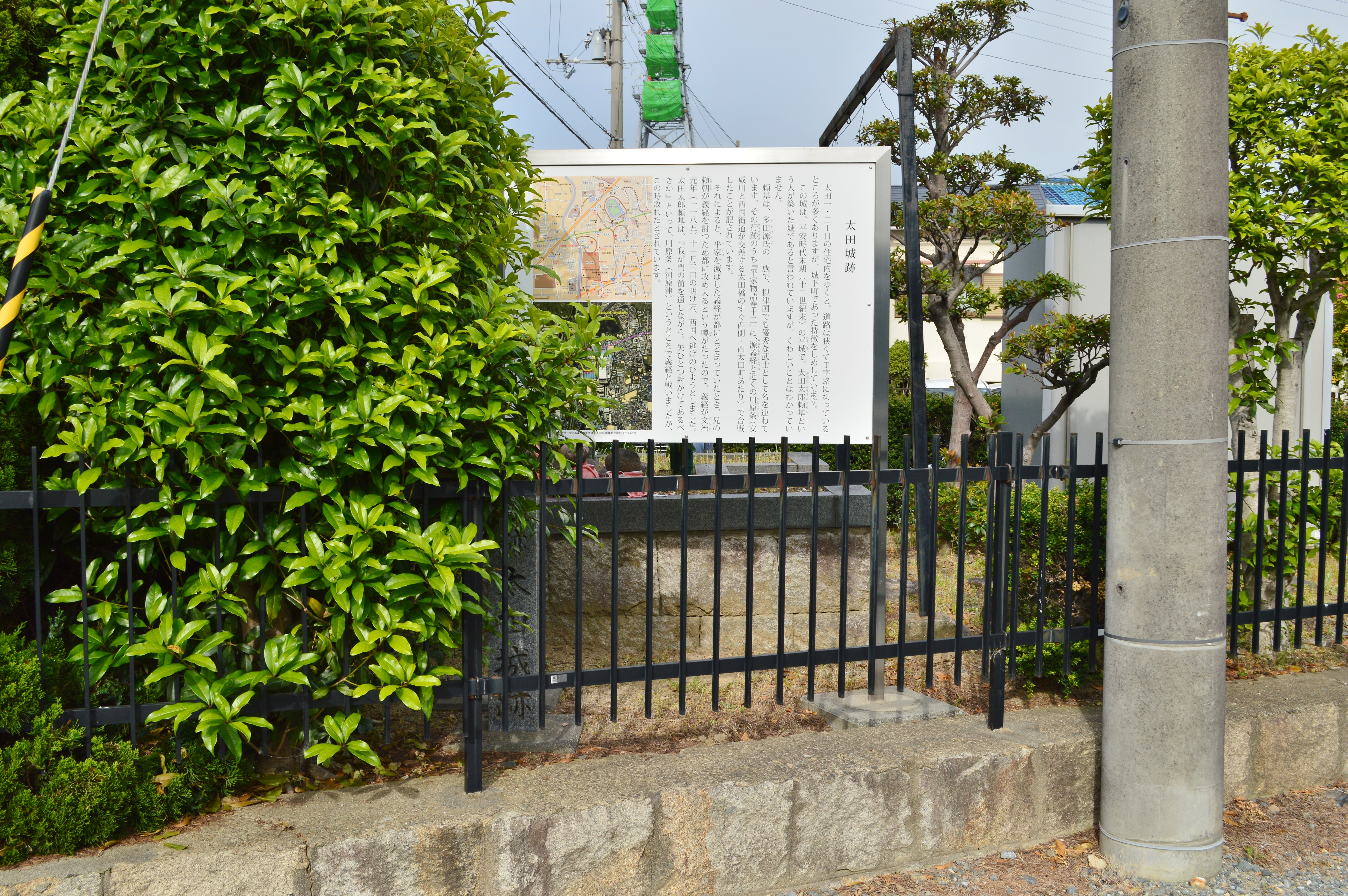 摂津太田城 石碑・説明板 Nikon D3200